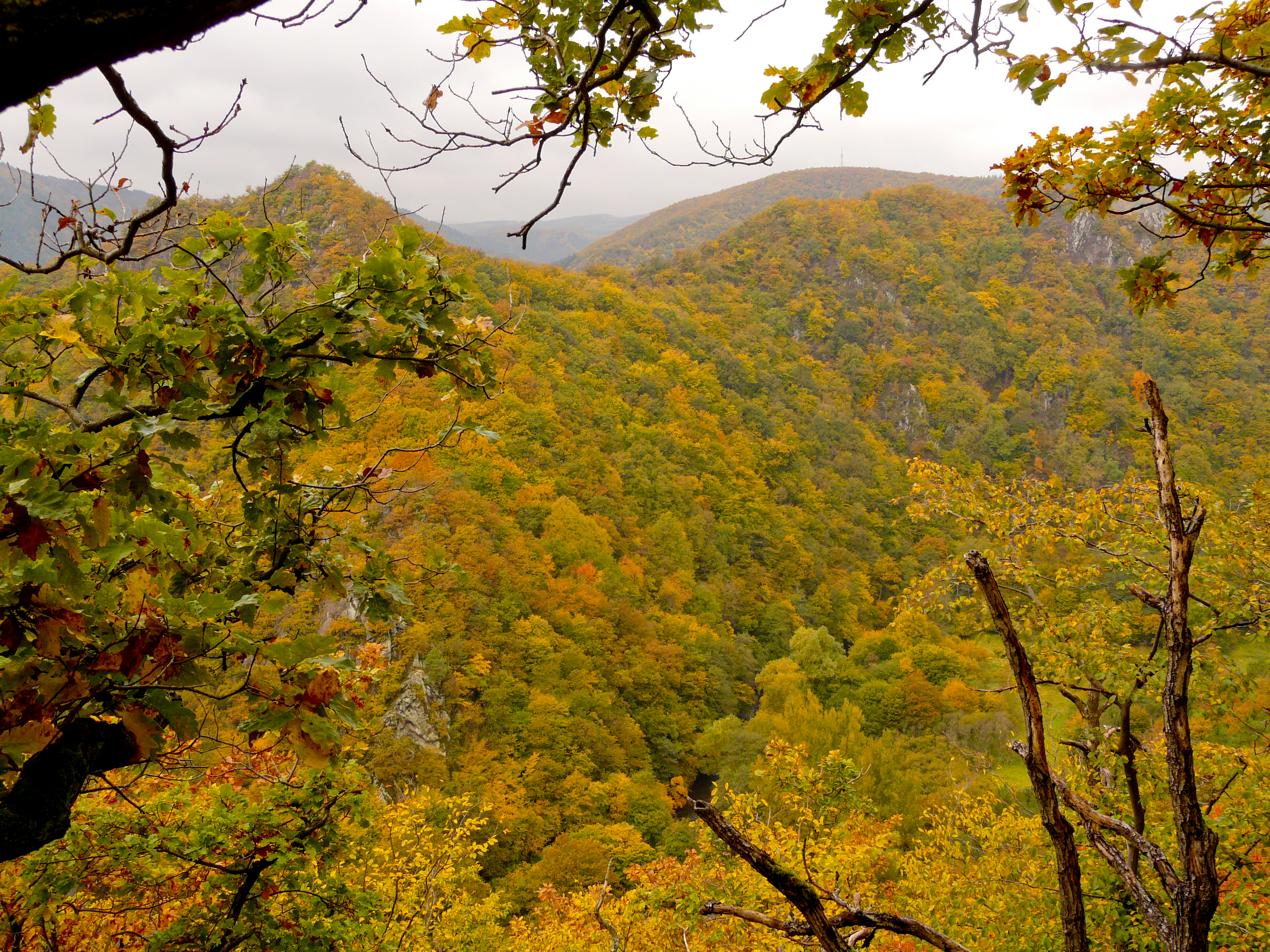 NSG Rheinland-Pfalz 7131-010 (Ahrschleife bei Altenahr)